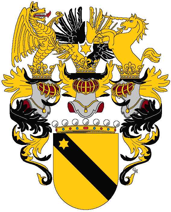 Wappen des österreichisch-ungarischen Diplomaten Albin Ritter von Vetsera (1825–1887), verliehen anlässlich seiner Erhebung in den österreichischen Freiherrenstand 1870. Zeichnung von Gerd Hruška ( Für weitere Informationen zu dieser Standeserhebung siehe (